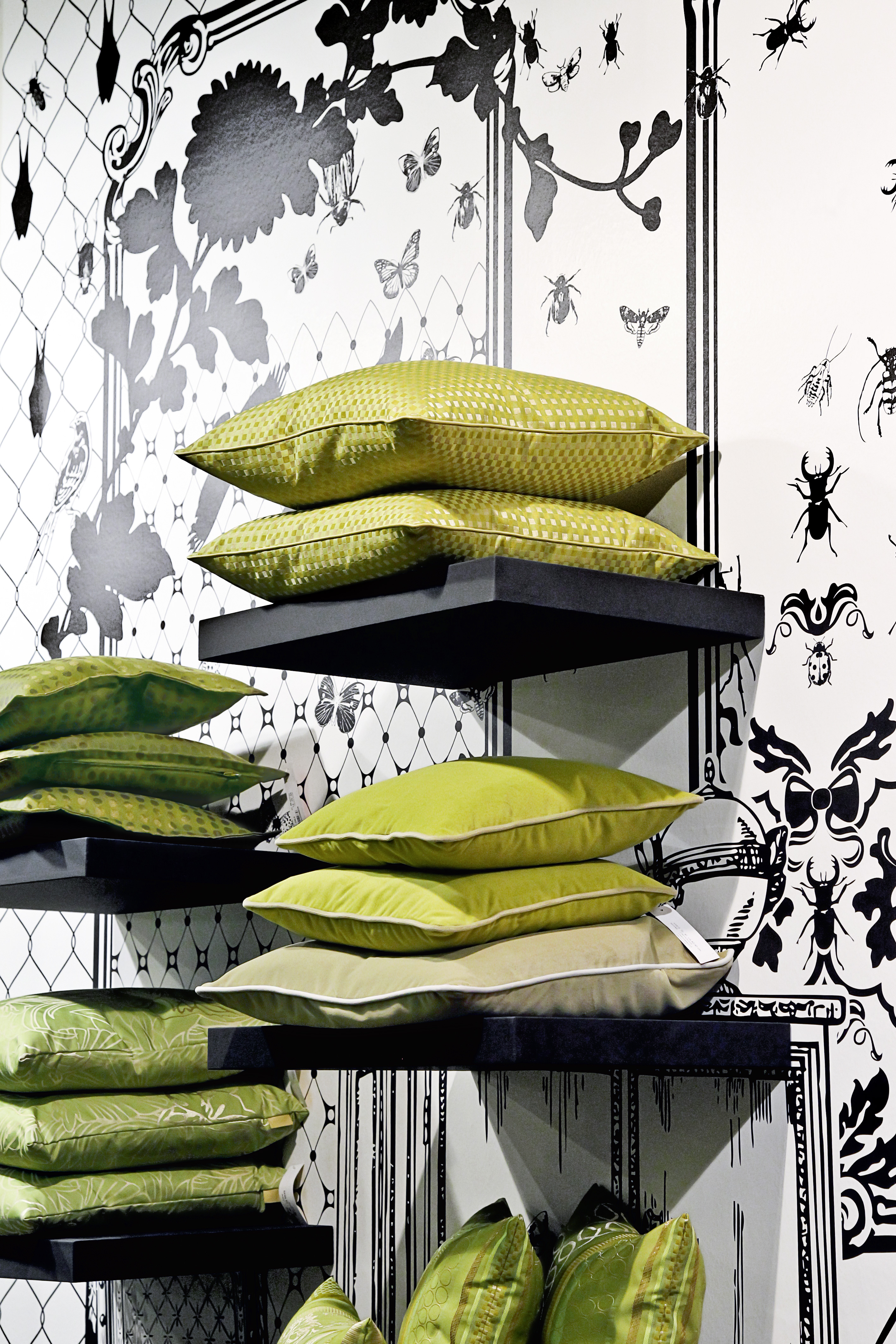 Heimtextil Produktgruppe Upholstery